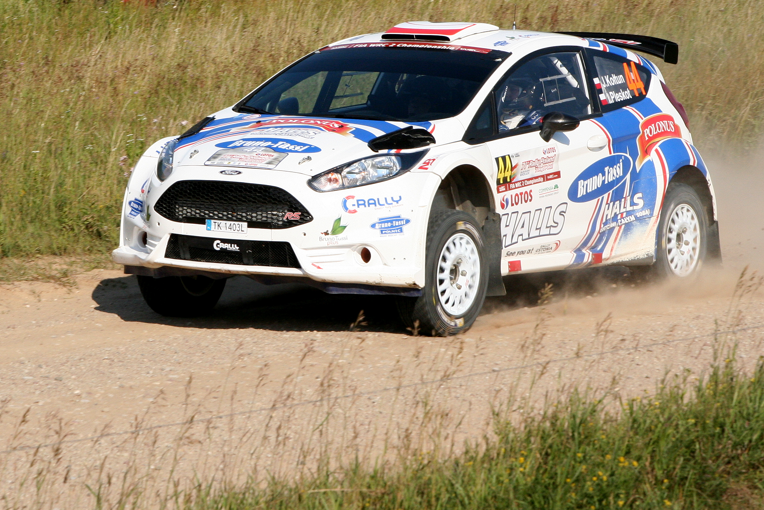 Jarosław Kołtun podczas Rajdu Polski 2014, 11 OS Chmielówka 1